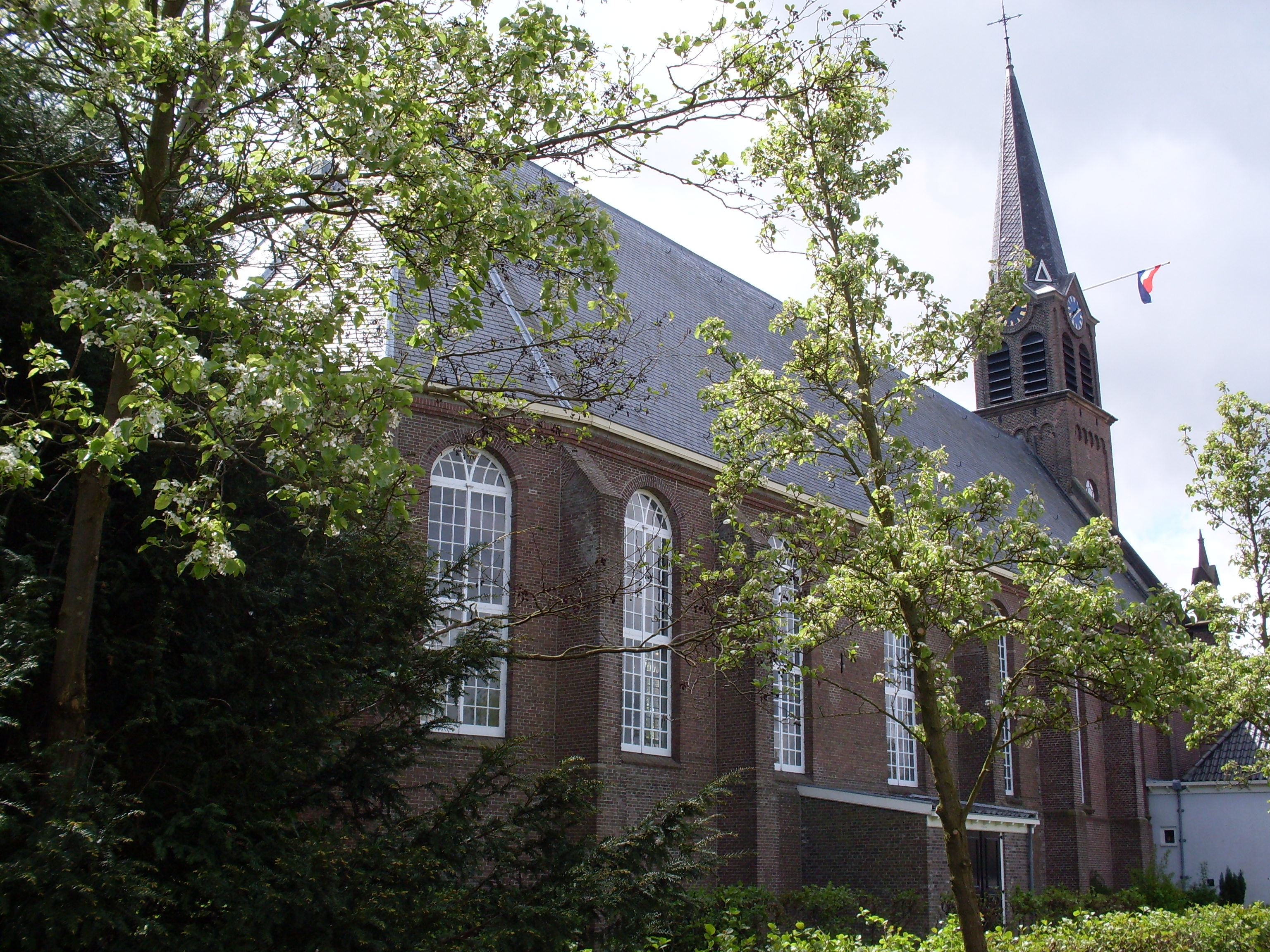 Hervormde kerk Ilpendam.